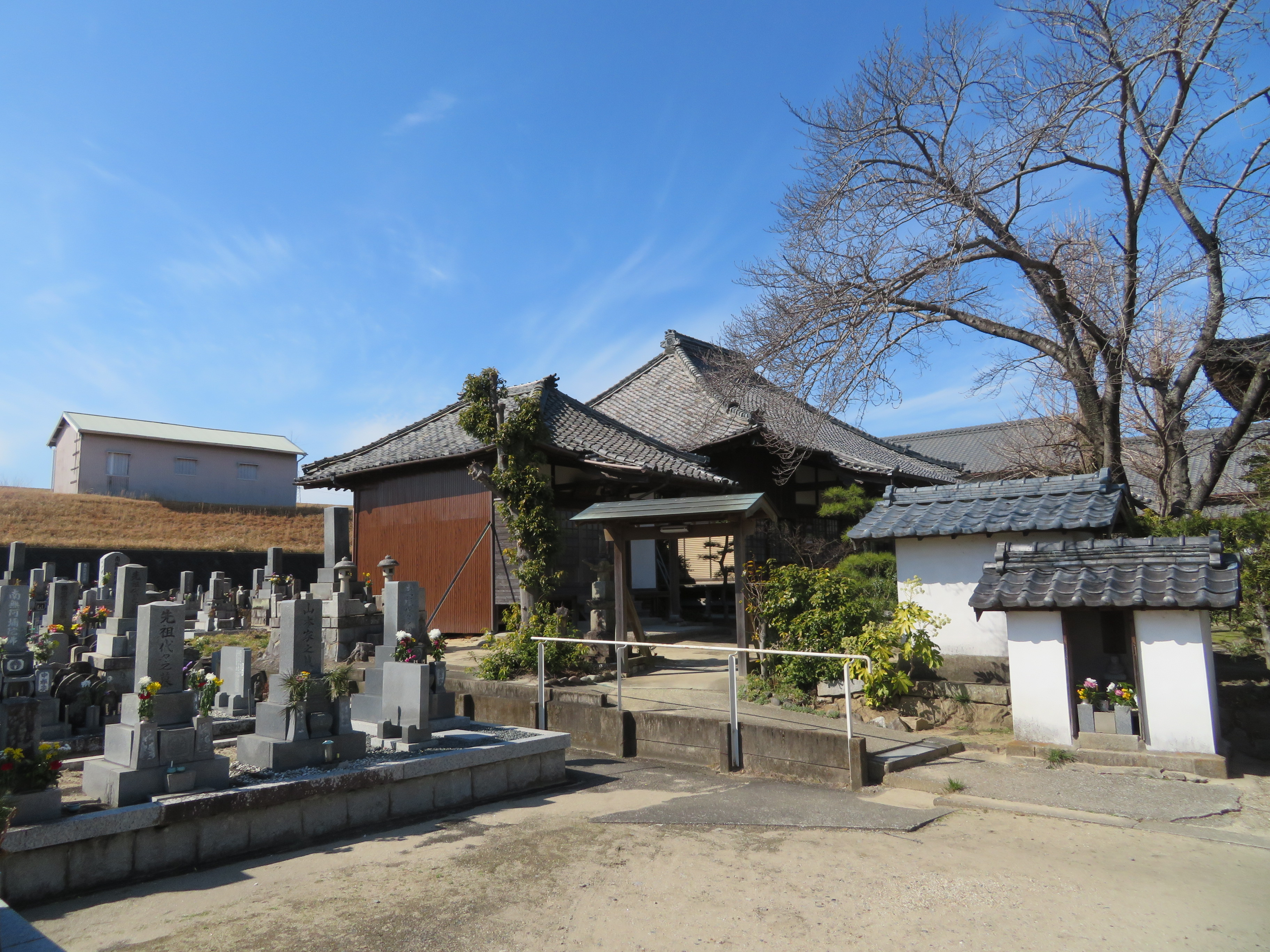 大圓寺（岡崎市大門）